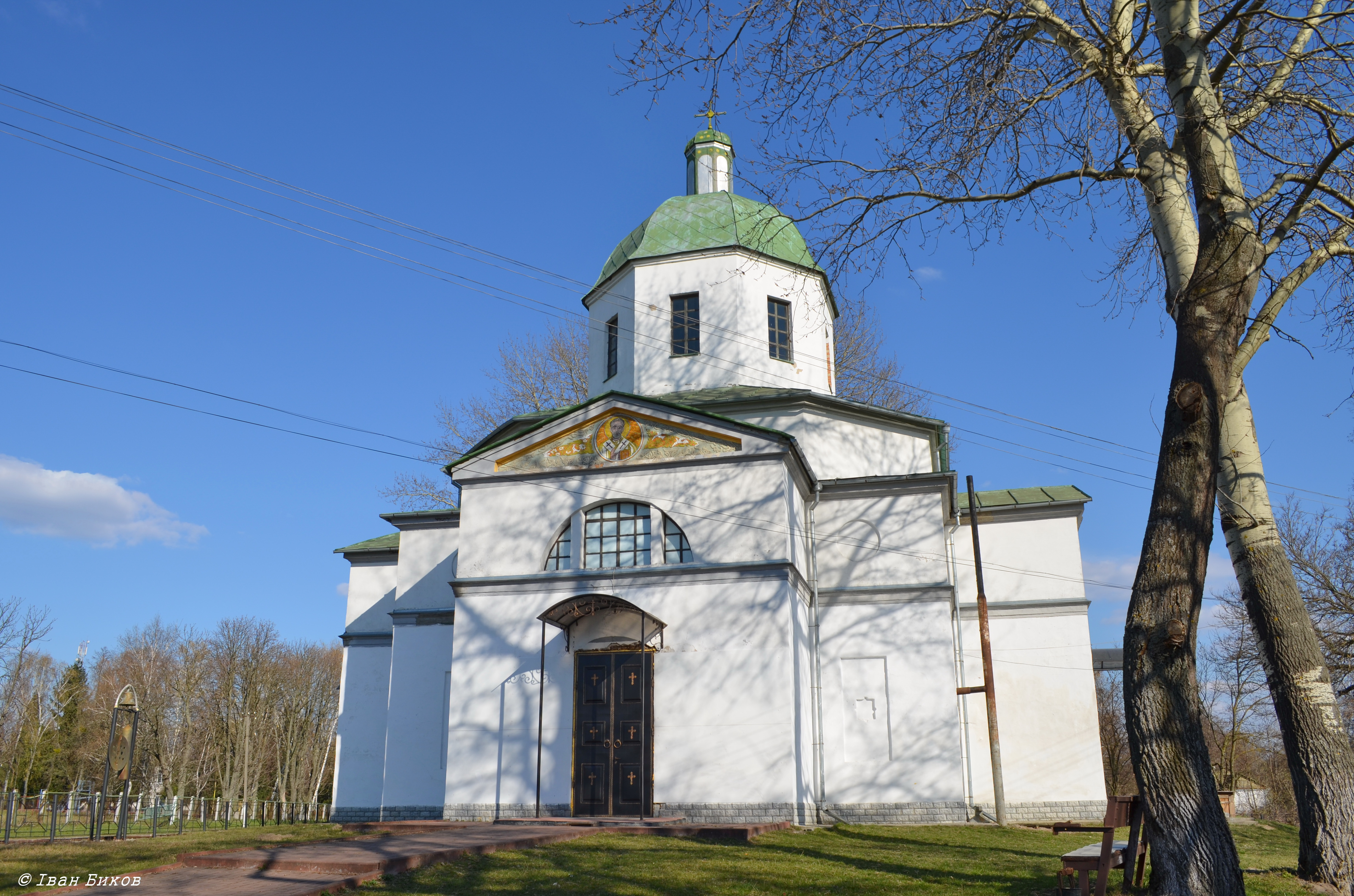 Миколаївська церква (мур.), село Войкове